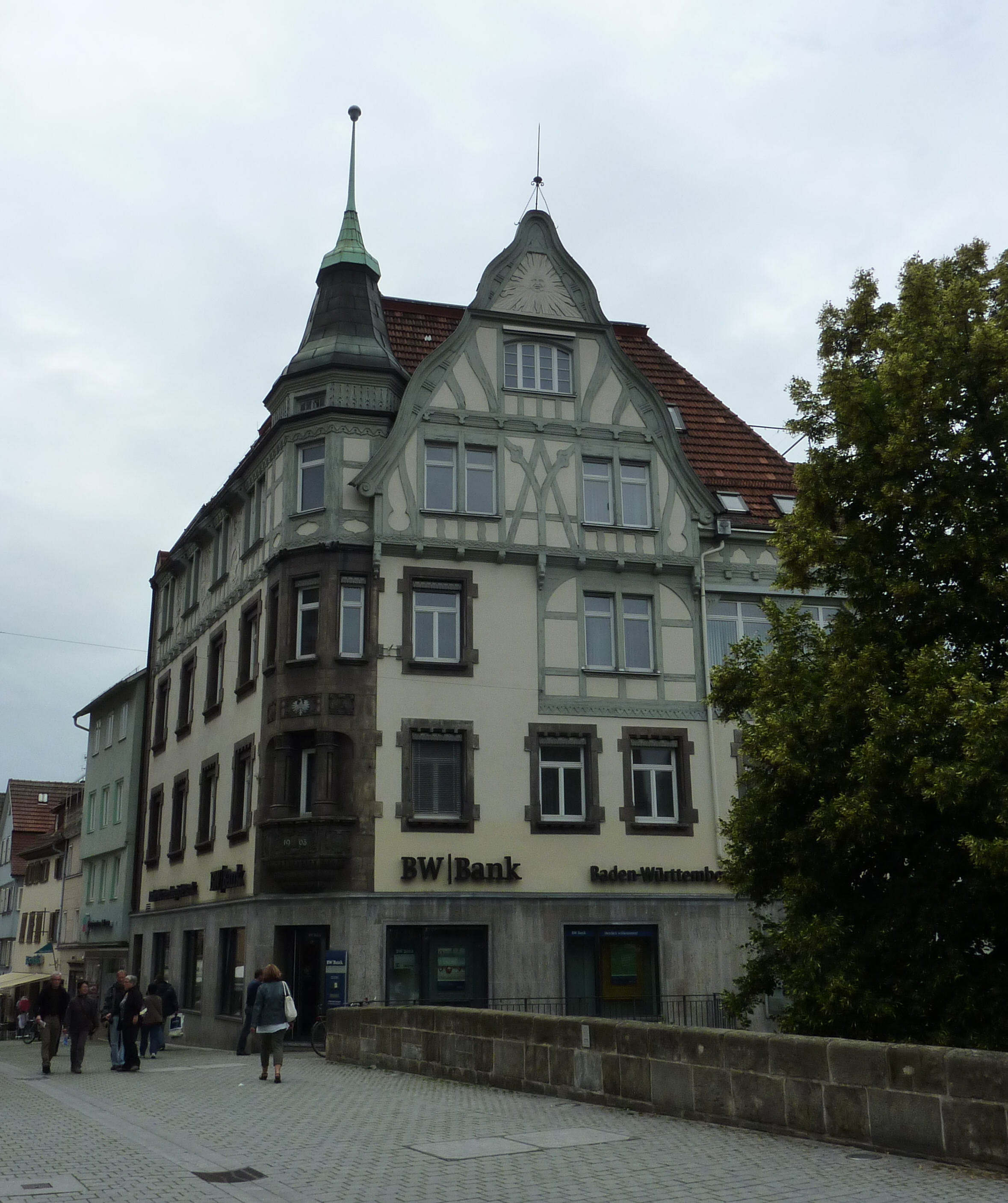 BW-Bank, Bauwerk auf der Inneren Brücke 26 in Esslingen. 1903 nach Entwürfen von Hermann Falch für Albert Leuze erbaut.